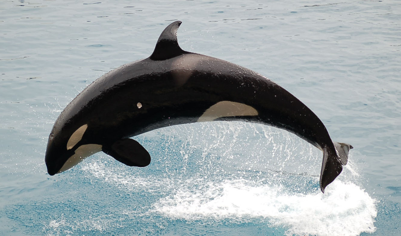 Jumping Orca